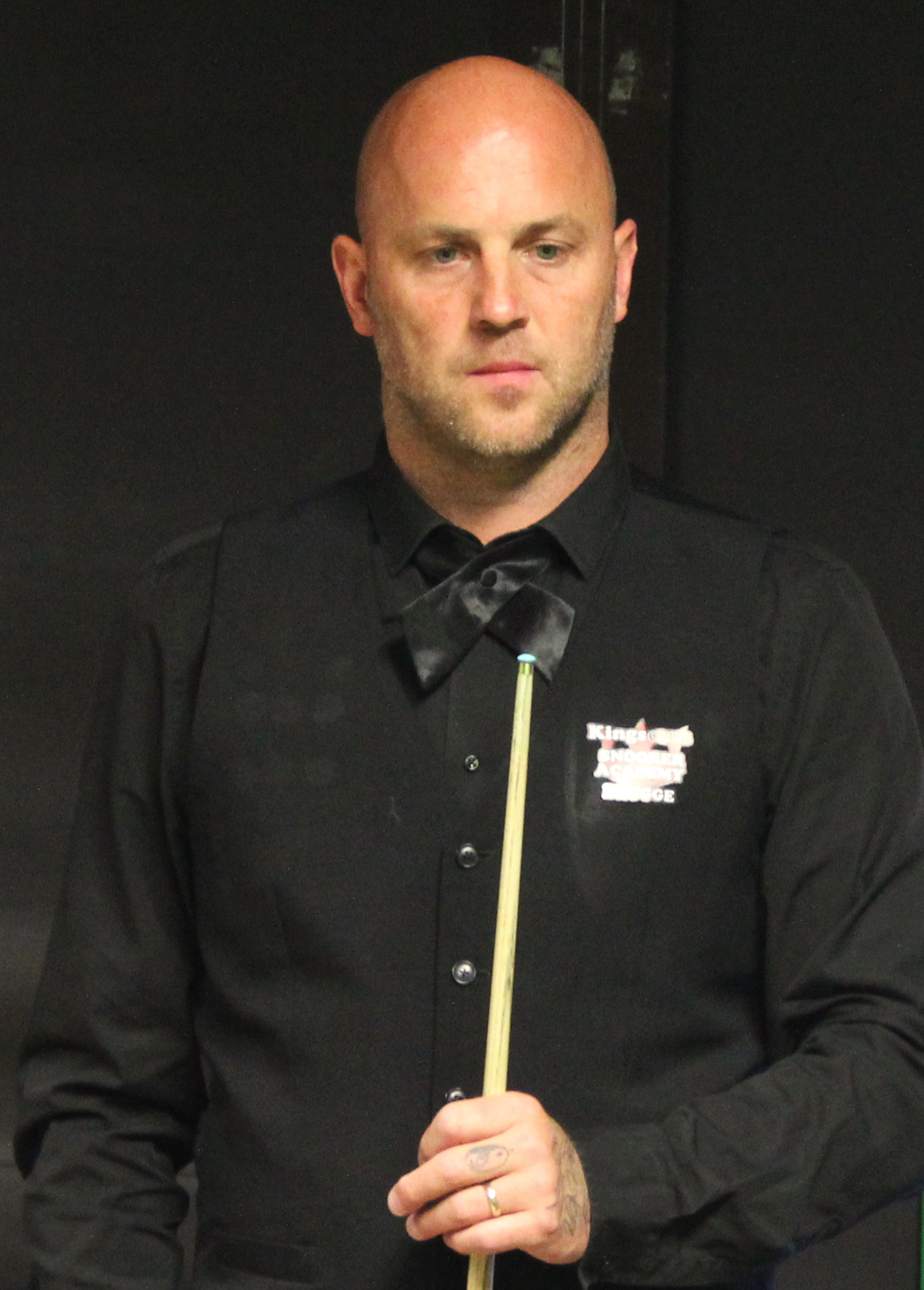 Mark King beim Paul Hunter Classic 2016